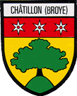 Wappen von Châtillon (Broye) Kanton Freiburg Schweiz